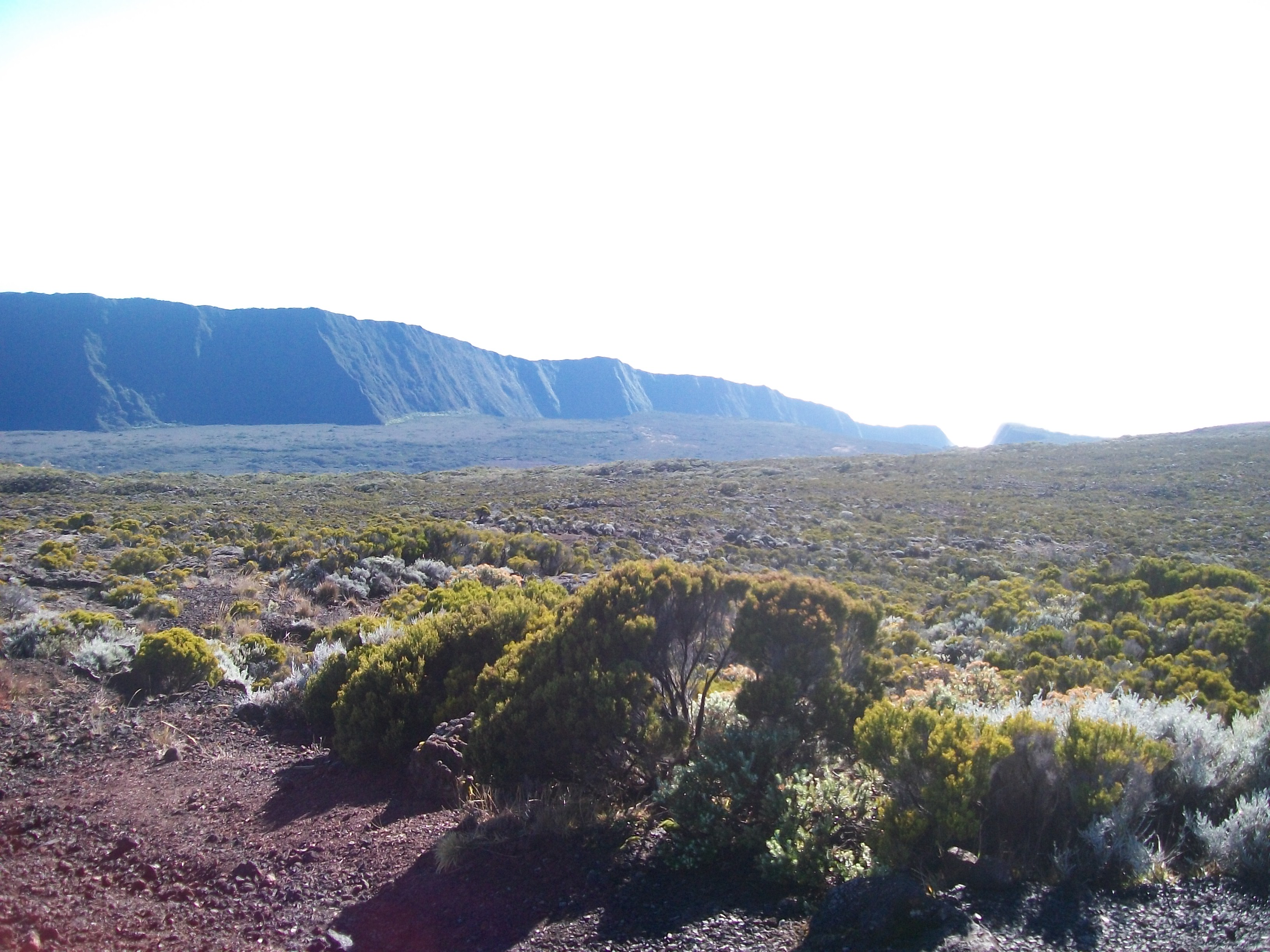 étendue de végétations endémiques, en arrière plan le Fond de la Rivière de l'Est.